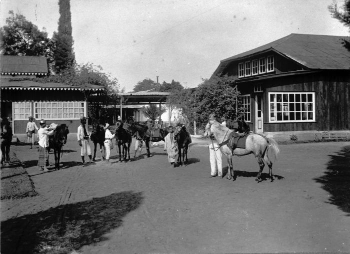 Foto. Paarden en personeel bij het Hotel te Nongkodjadjar, Java.